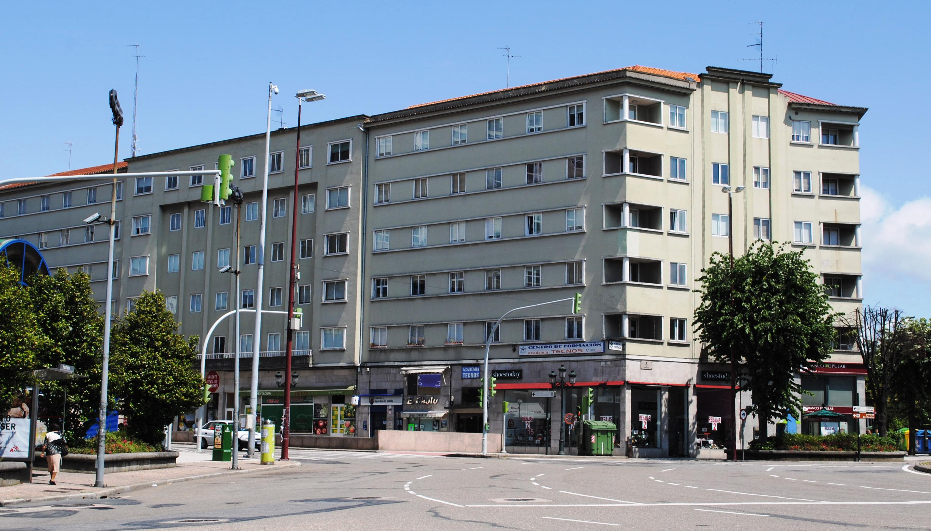 Vexa o título e as categorías.